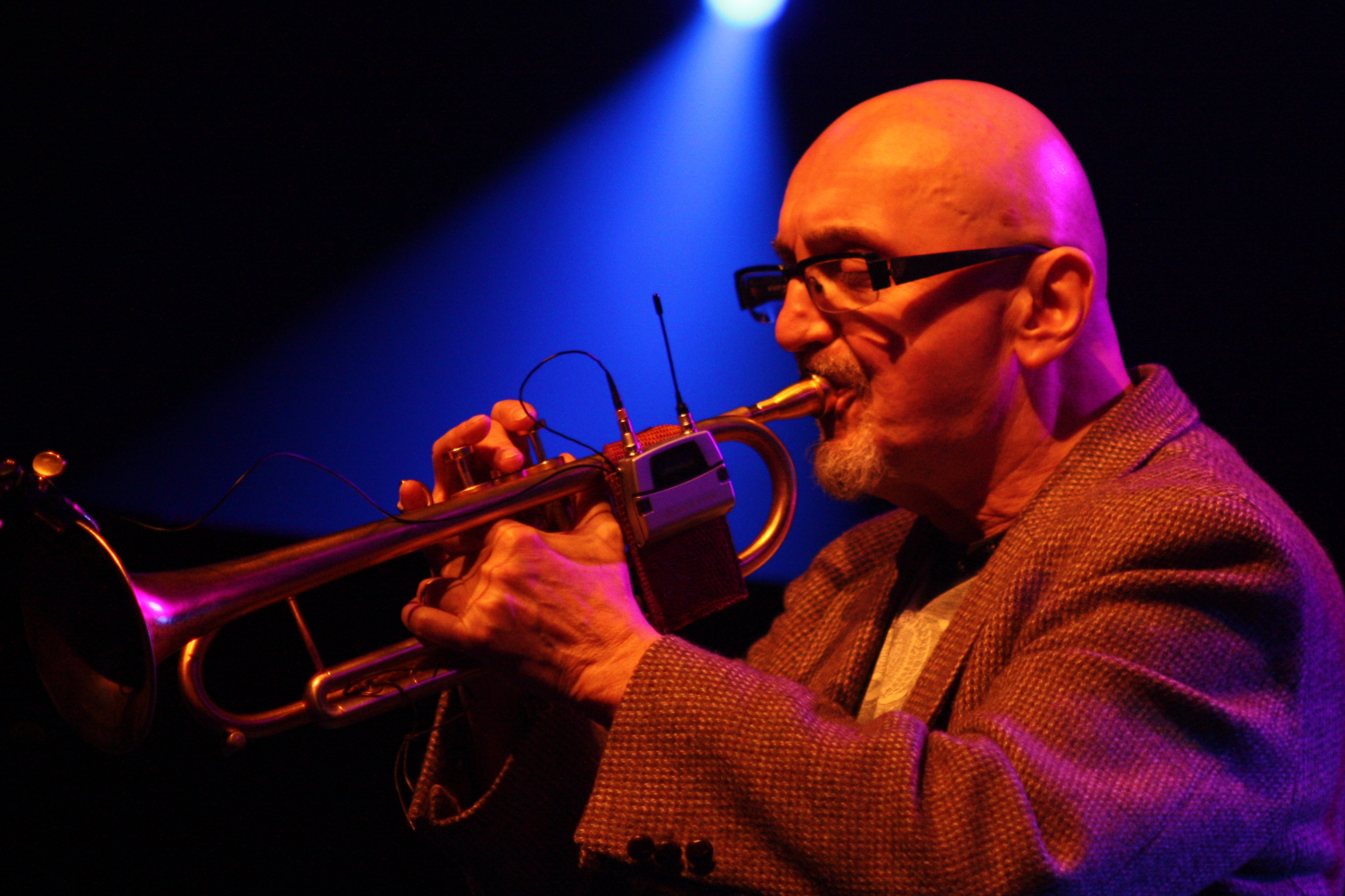 44. Deutsches Jazzfestival Frankfurt 2013: Tomasz Stanko